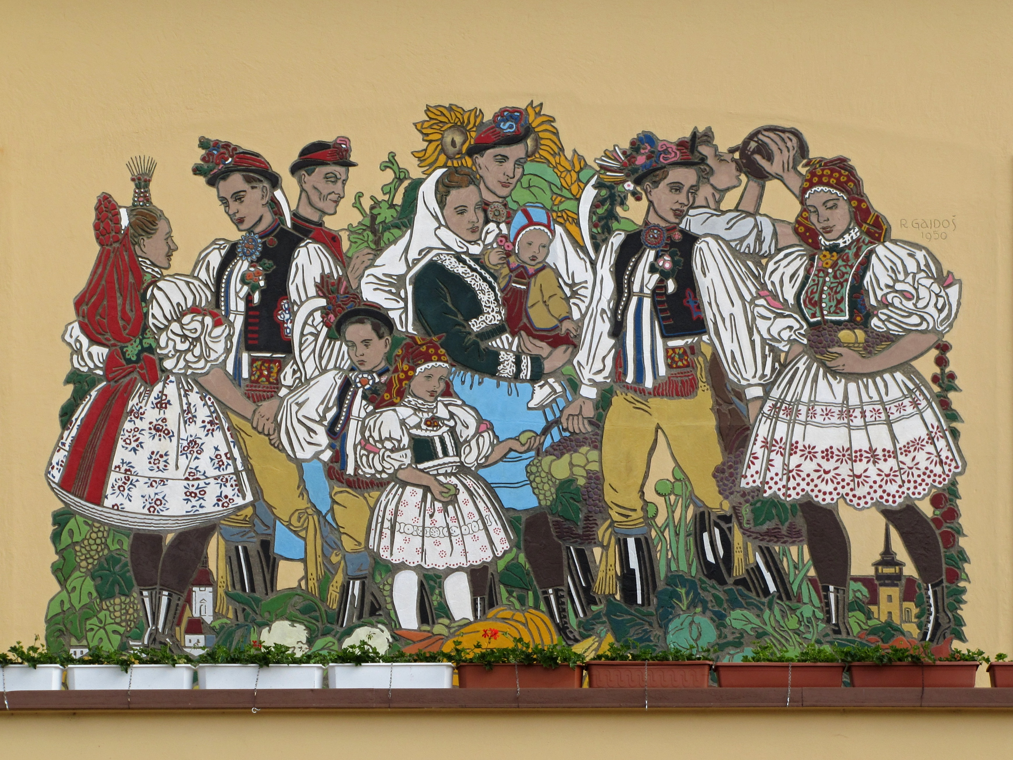 Radnice ve Vracově z let 1948–1950, sgrafito v prvním patře od akademického malíře Rudolfa Gajdoše z roku 1950